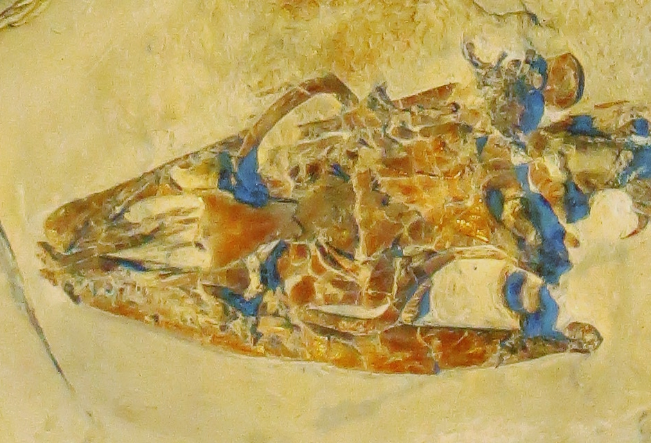 Fossil of Pontosaurus - Took the picture at Museo di Storia Naturale, Milano